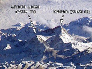 Makalu.